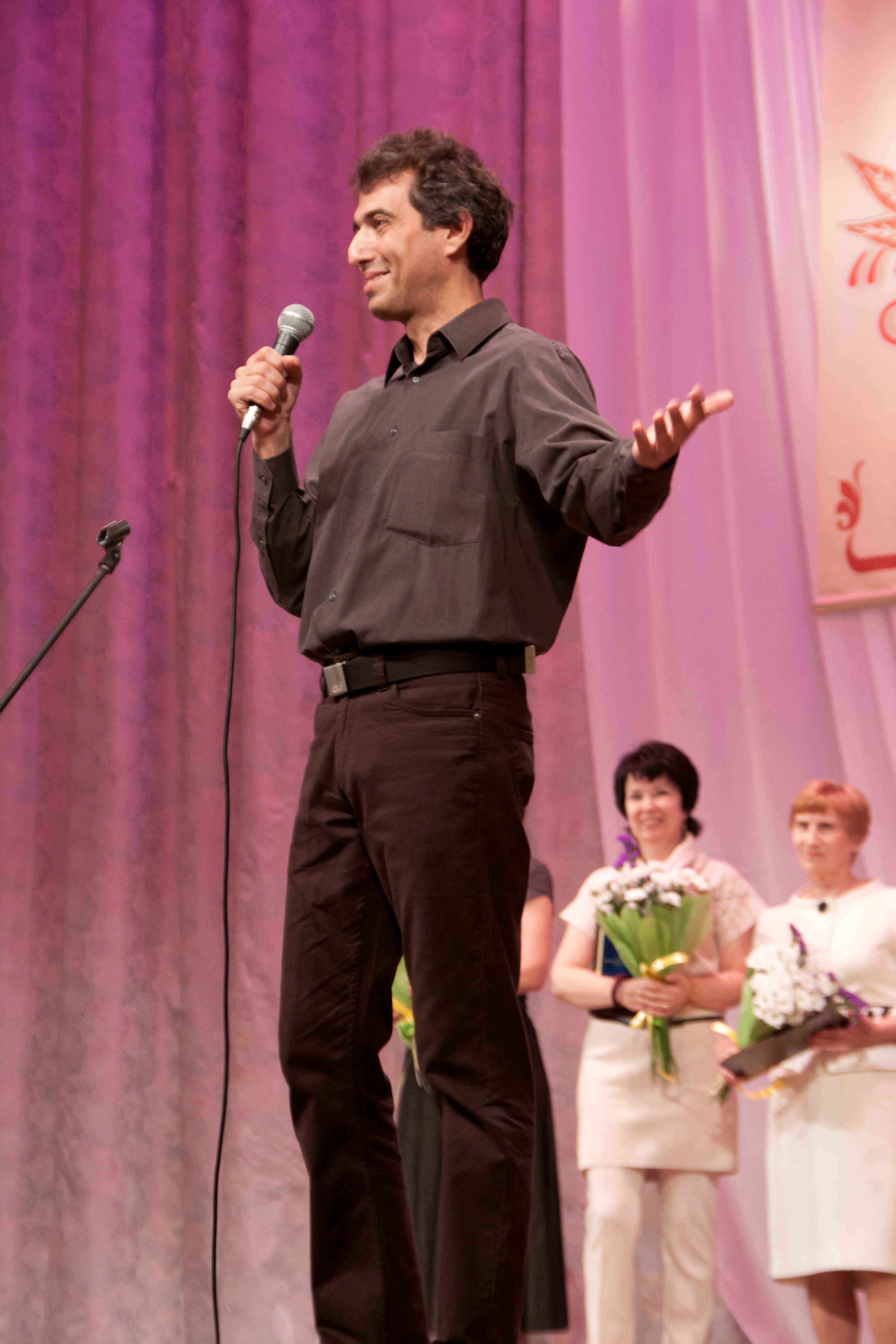 Детский писатель Артур Гиваргизов